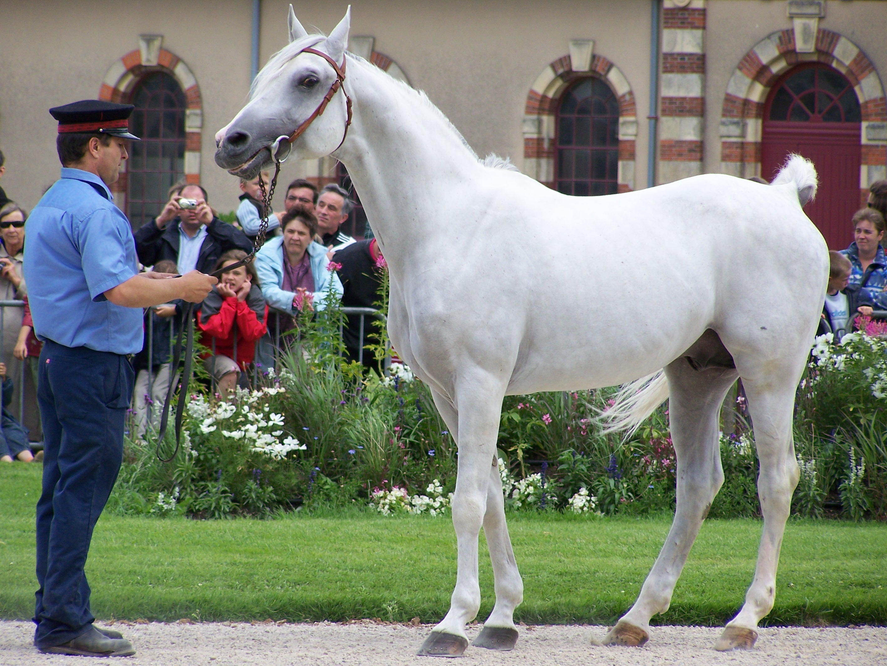 For